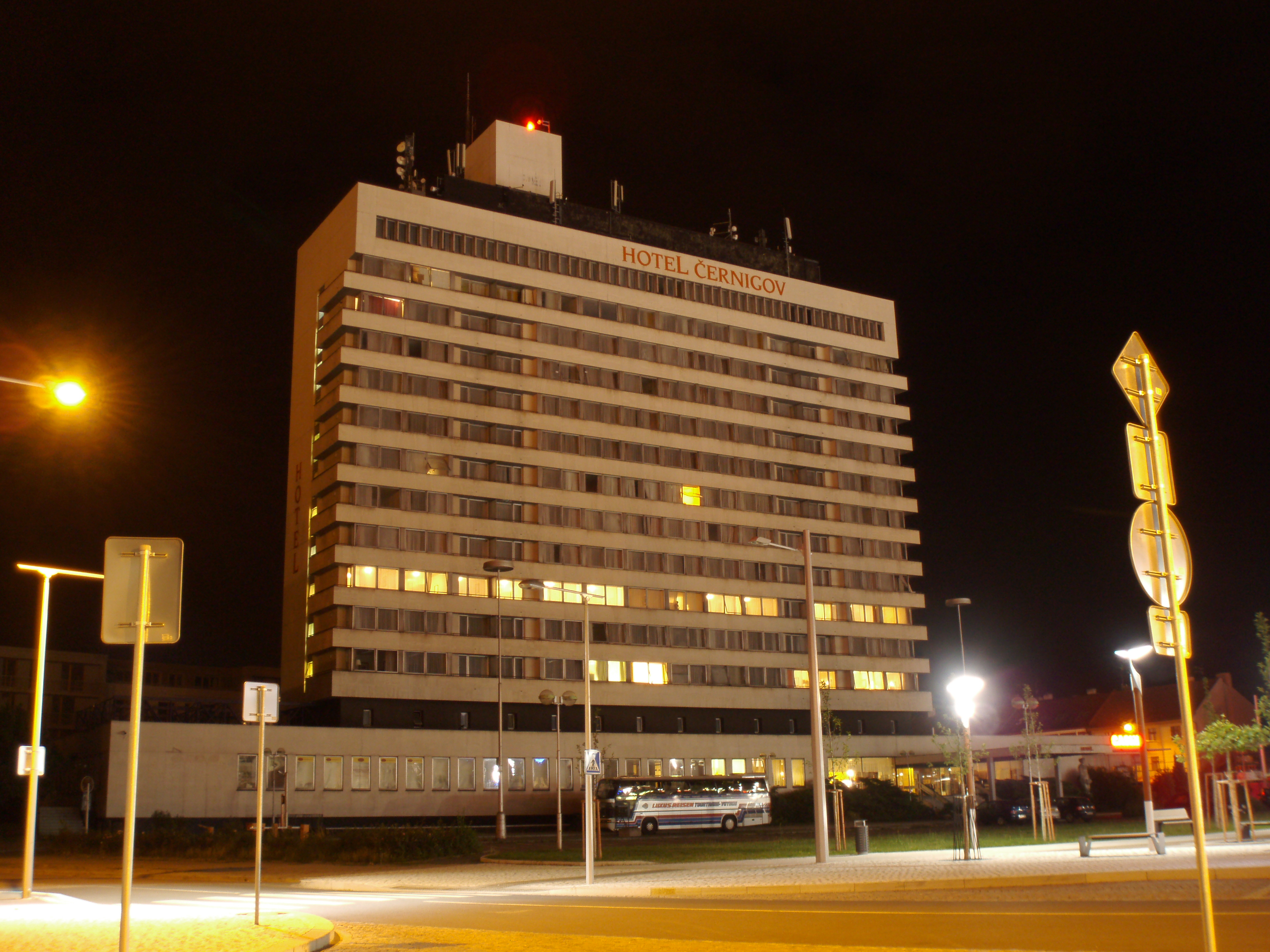 Hotel Černigov